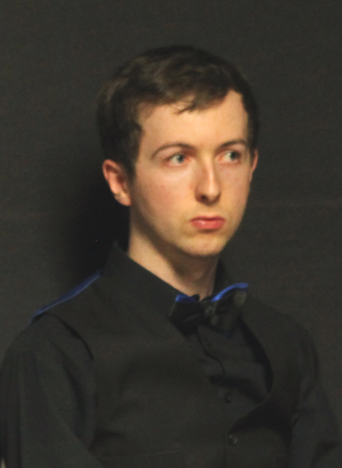 Scott Donaldson beim Paul Hunter Classic 2016